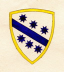 Stemma della famiglia Bischeri del Peverada